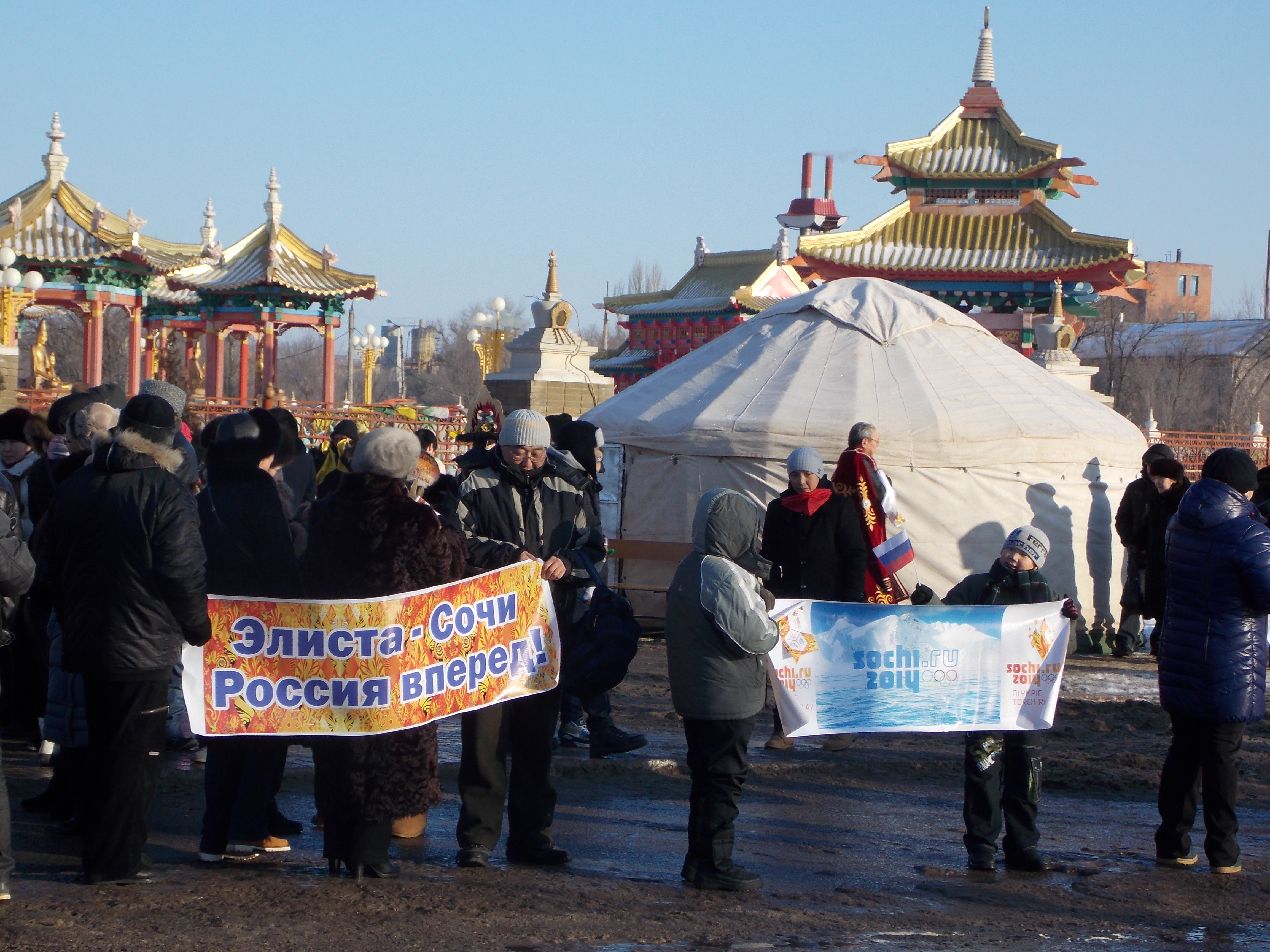 Встреча Олимпийского огня в Элисте 25 декабря 2013 года